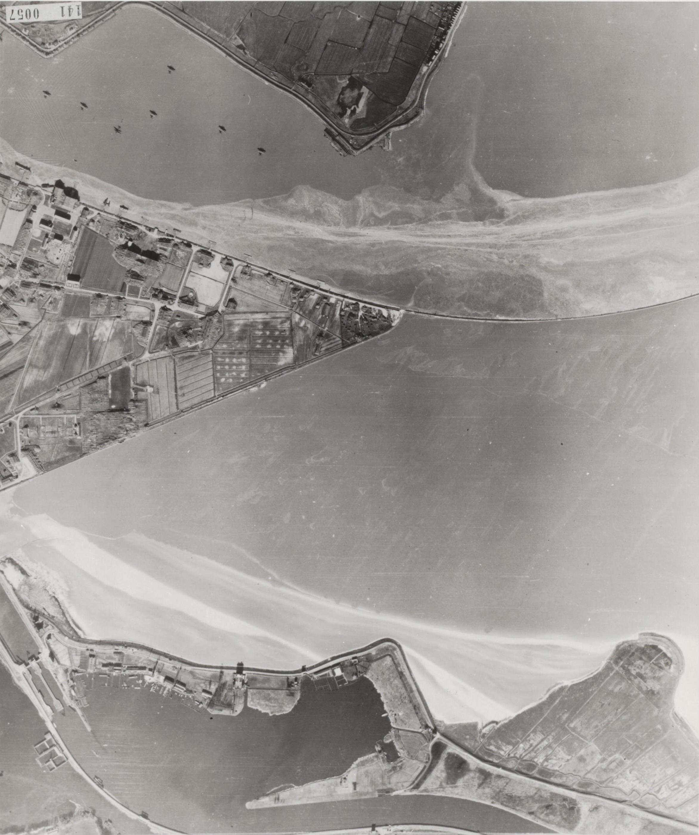 Luchtopname. Schellingwoude bij Amsterdam. Voor 1940 marinehaven voor watervliegtuigen. Tijdens de bezetting steunpunt voor watervliegtuigen van de Duitse Kriegsmarine. Het in de IJmond gelegen eilandje is tot 1945 als een kleine gecamoufleerde vesting ingericht. De vliegtuigen liggen voor de veiligheid met ruime onderlinge afstand in het IJ